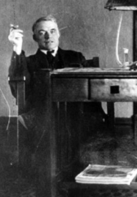 Andrew Kehoe sitting at a desk